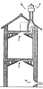 Principe de ventilation des hôpitaux par Léopold Genneté, 1767. La figure 124 tirée de son ouvrage indique presque tous les progrès réalisés au XIXe siècle. Il conseille: 1° un foyer extérieur pour l'introduction de l'air pur préalablement chauffé en hiver; 2° la pente à donner au plafond pour faciliter la sortie de l'air vicié par un tuyau central 3° des gaines séparées pour chaque étage; 4° un foyer d'appel placé dans les combles où il indique clairement tous les moyens usitésau XIXe siècle y compris la prise d'air sur les toits quand on a à craindre émanations du sol